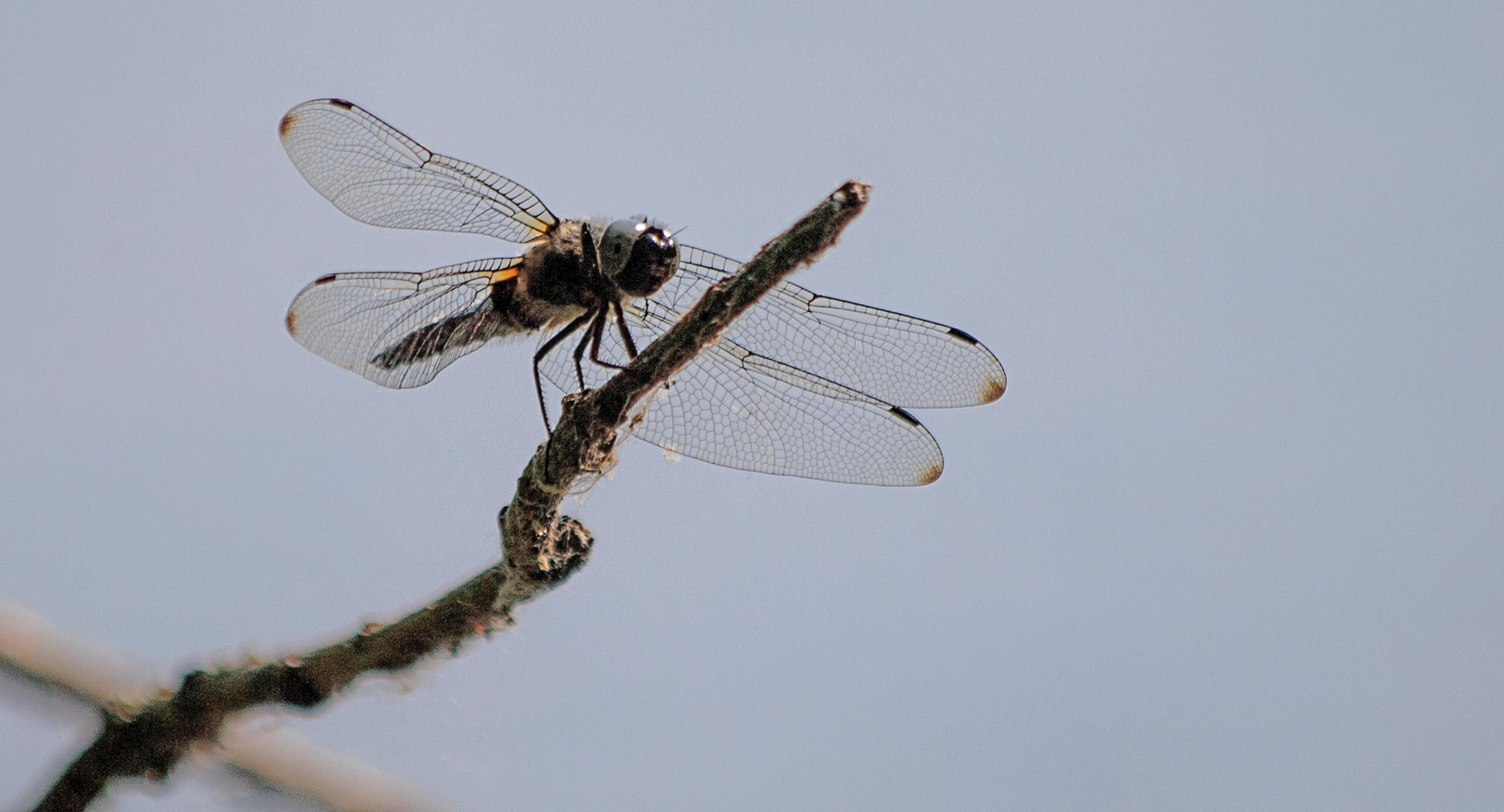 Aderung von Libellenflügeln